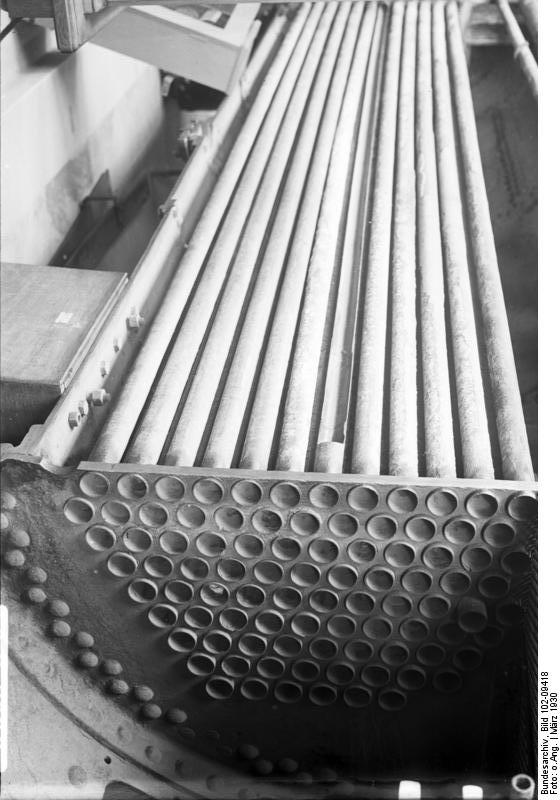 Blick in den Magen einer D-Zug-Lokomotive! Ein interessanter Querschnitt in das Innere einer Schnellzug-Lokomotive mit seinen dicht nebeneinander gelagerten Dampfröhren gesehen.